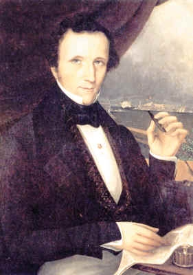 Adolph Godeffroy (1814-1893) war der erste Vorsitzende der 1847 gegründeten Hamburg-Amerikanischen Packetfahrt-Actiengesellschaft.